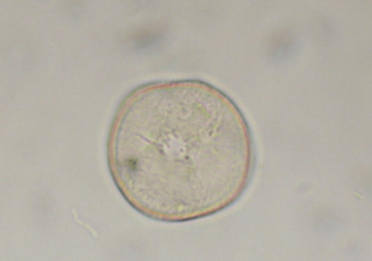 Grass Pollen